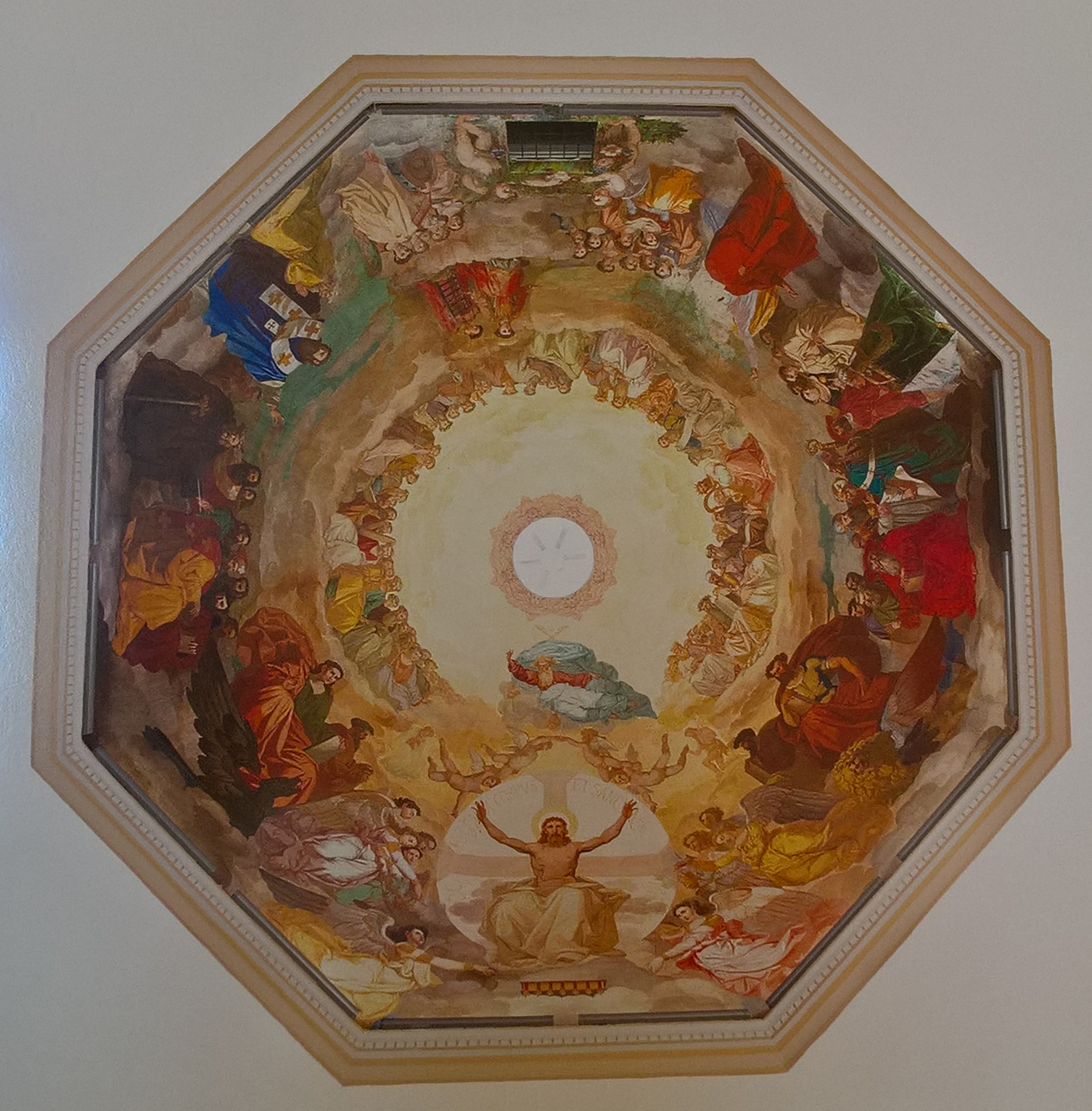 Fresko von Girolamo Varni in der Kuppel der Sant'Agostino Kapelle mit dem Titel: Der Triumph des Glaubens